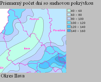 Počet dní so snehovou pokrývkou.